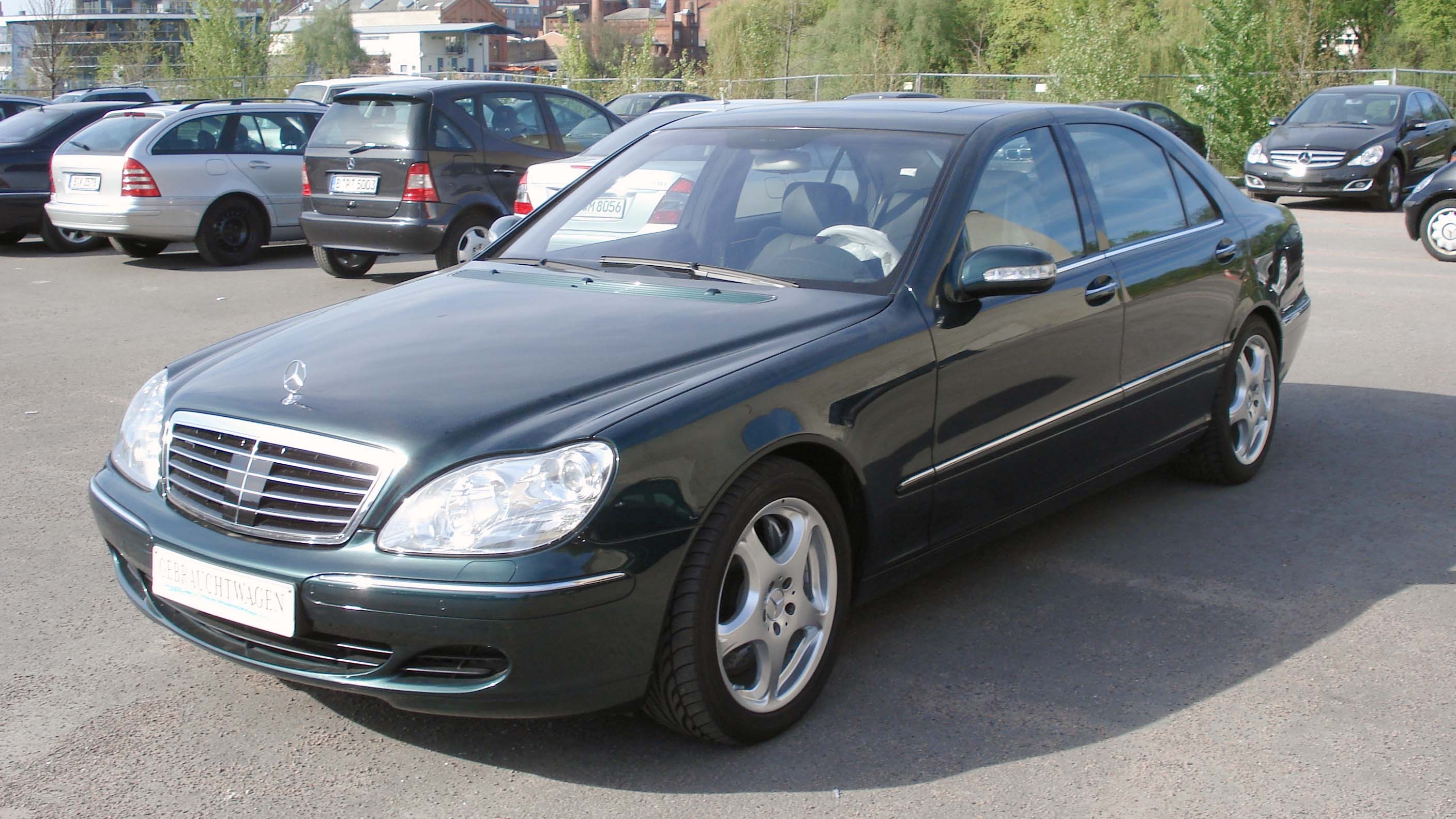 Mercedes-Benz S 600